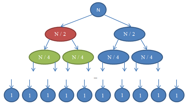 merge sort recursion